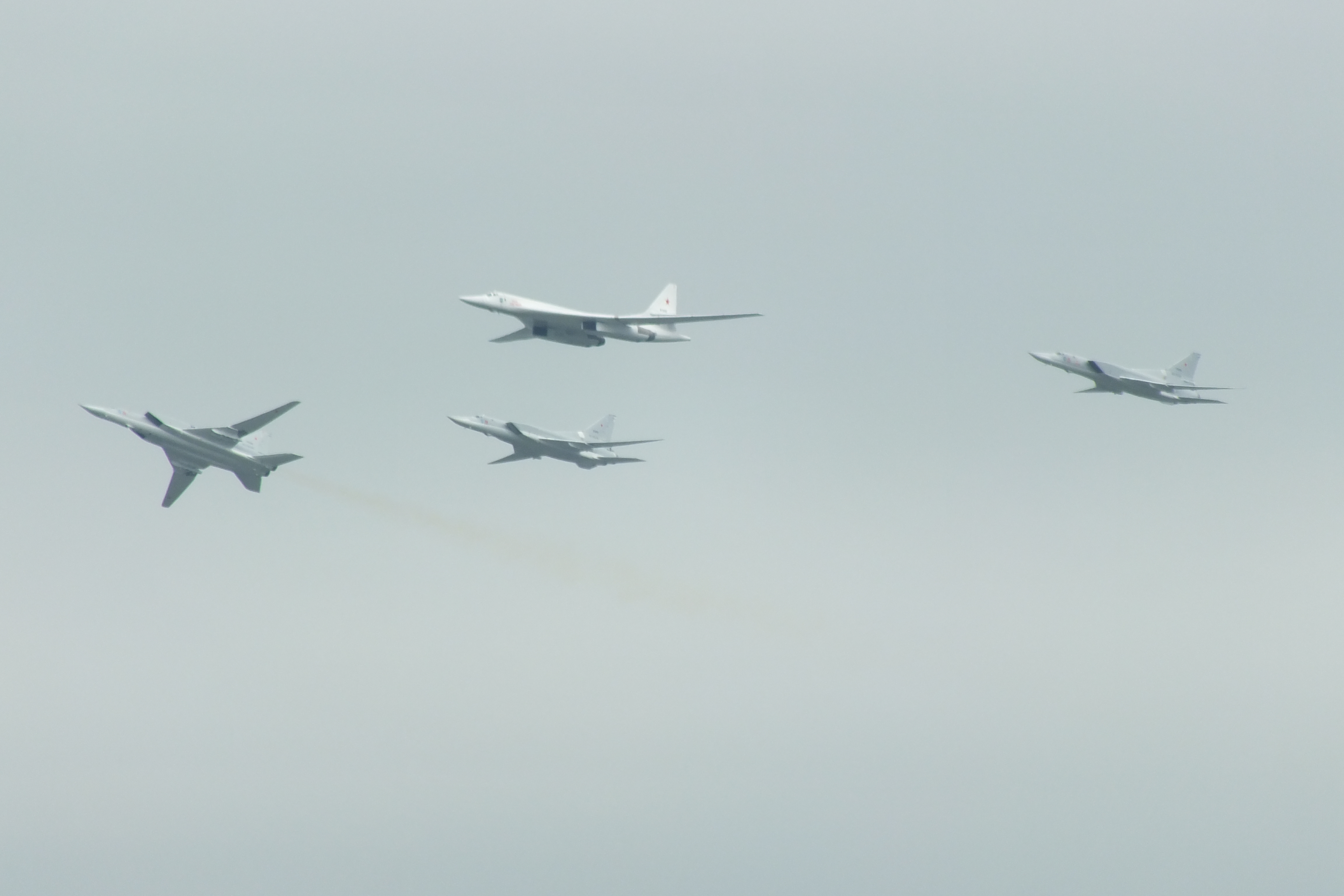 Авиация на Параде Победы 2020 года в Москве в честь празднования 75-летия Победы в Великой Отечественной войне. Состоялась лишь авиационная часть (пусть и в плохую погоду), ввиду распространения коронавирусной инфекции COVID-19 в России. Вид из московского района Братеево